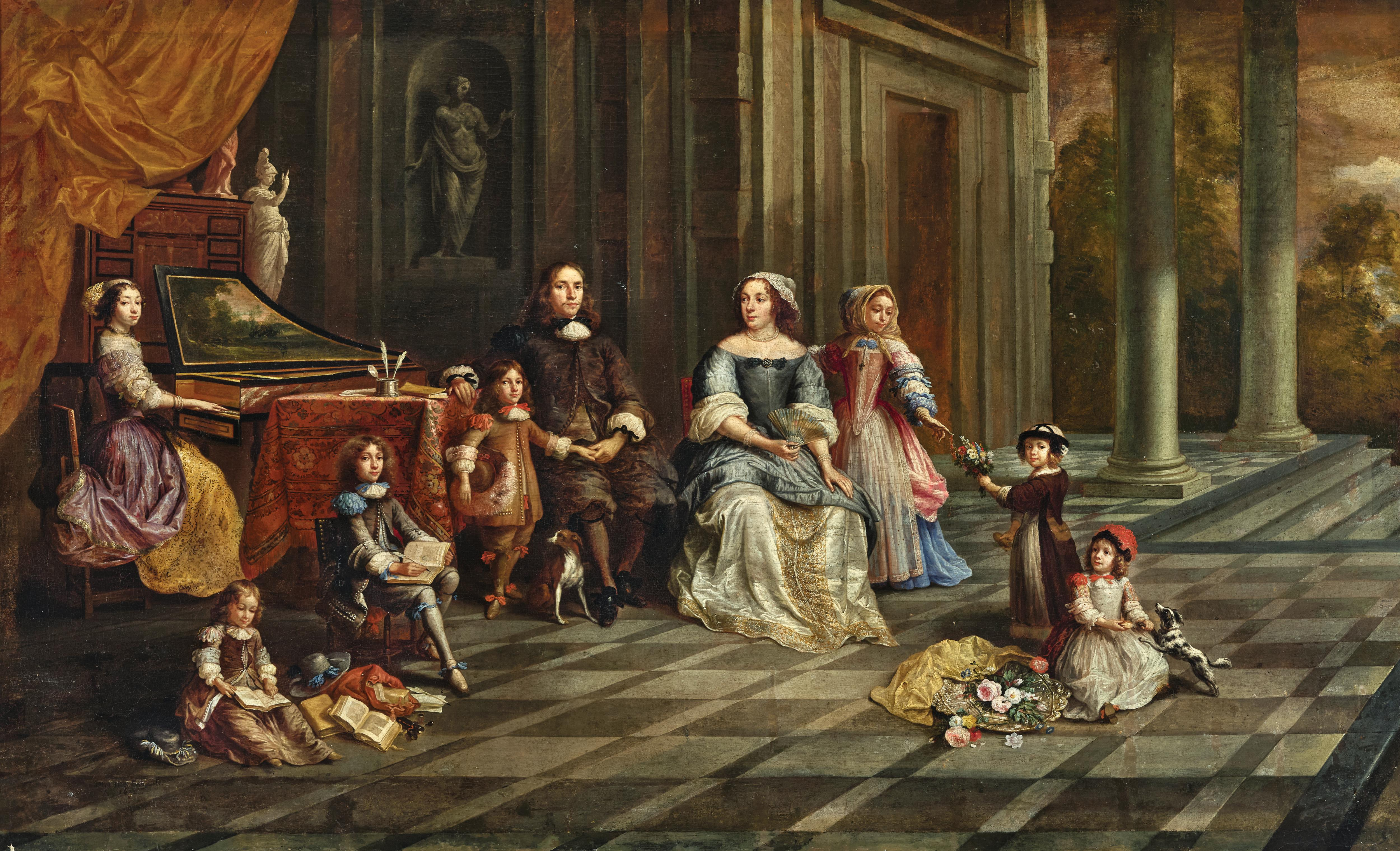 Retrato de la familia Janssens, óleo sobre lienzo, 110 x 180,5 cm. Firmado.